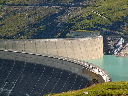 Knapp 85 Mio. Km³ Wasser werden hinter den Staumauern (Mooser- und Drossensperre) des oberen Staubeckens gespeichert, jedoch nicht nur zur Stromerzeugung, sondern auch als Trinkwasser-Reservoir. Der Mooserbodenspeicher ist der höchstgelegene der Kapruner Stauseen (2036m). Die Anreise allein ist schon ein kleines Abenteuer: Von Zell/See Richtung Kaprun und von dort über eine Serpentinenstraße bis zum Parkhaus beim Alpenhaus Kesselfall; dann zuerst mit dem Bus durch einige Tunnel, mit dem Lärchwand-Schrägaufzug den zweiten Teil und schließlich wieder mit dem Bus bis auf 2040m - der ganze Spaß für 16,- Euro. Fotografiert mit Sony DSC F828